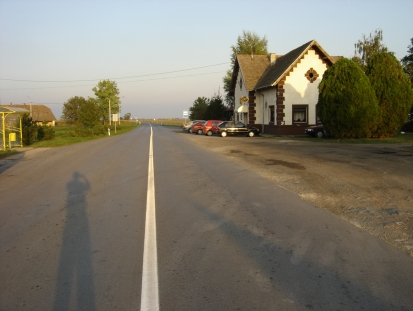 Čarda u Karancu